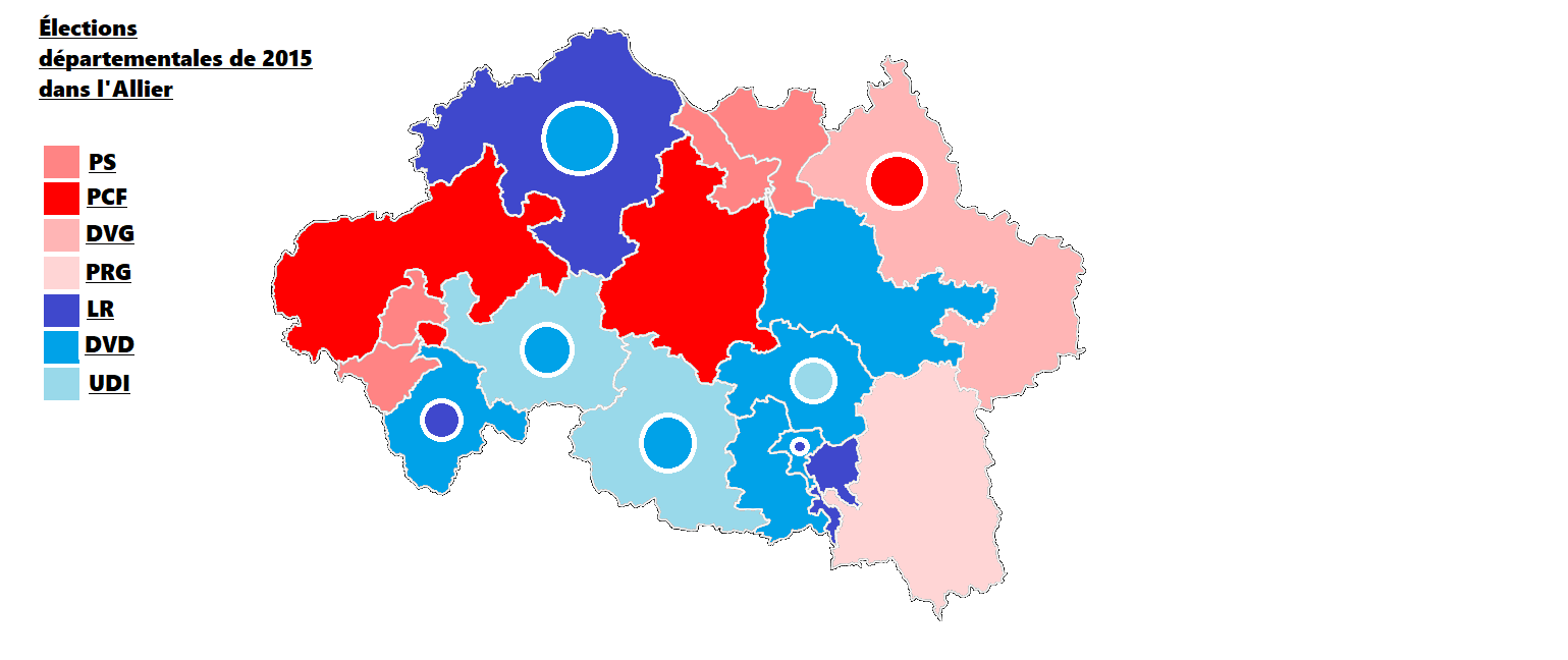 Élections départementales de 2015 dans l'Allier